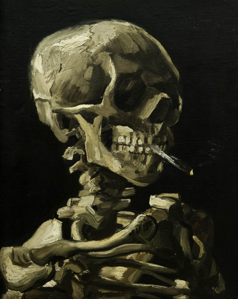 23 juni 2009, tgv Wiki Loves Art